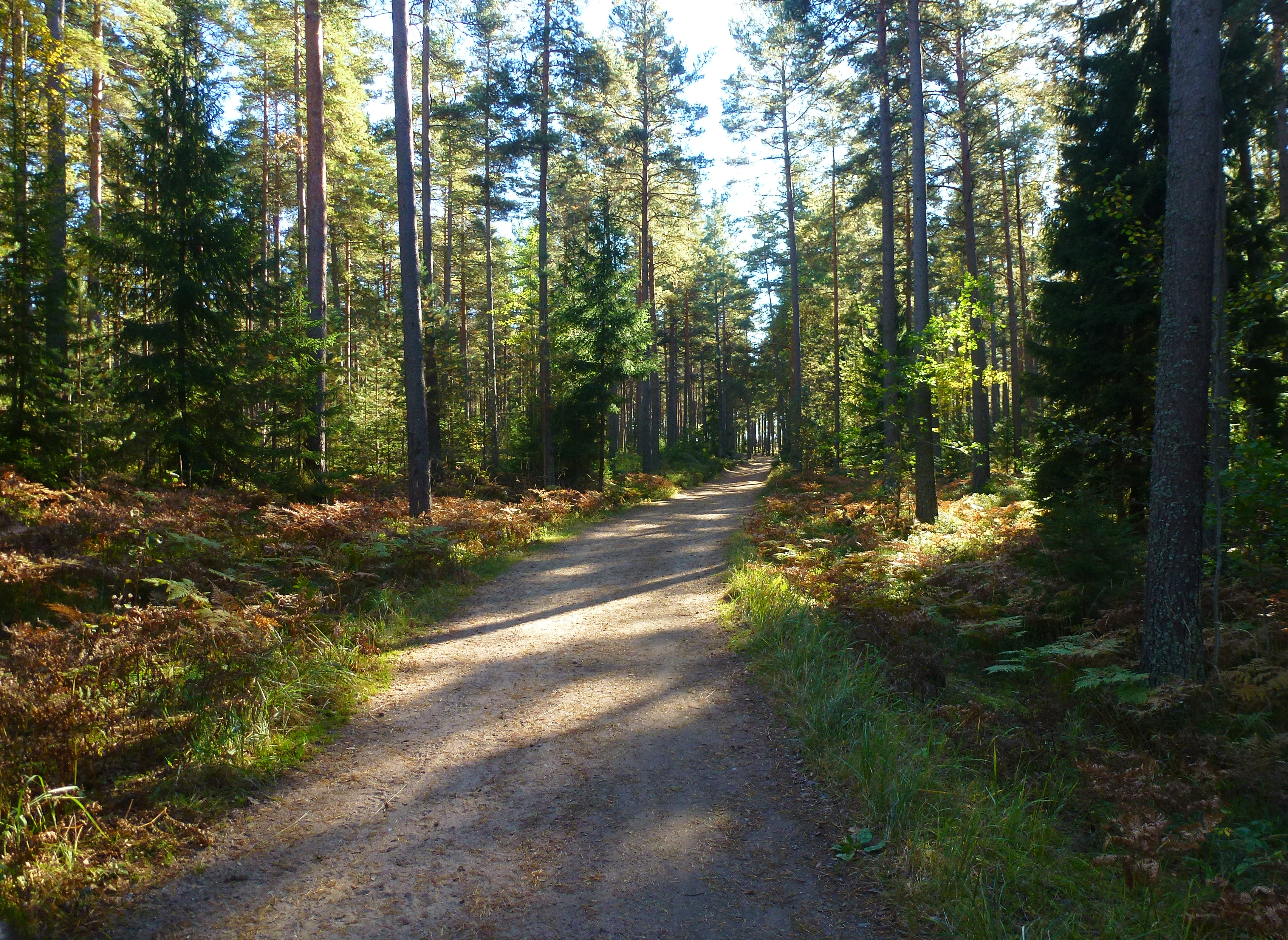 Vandringsled i östra Strålsjön – Erstavik naturreservat